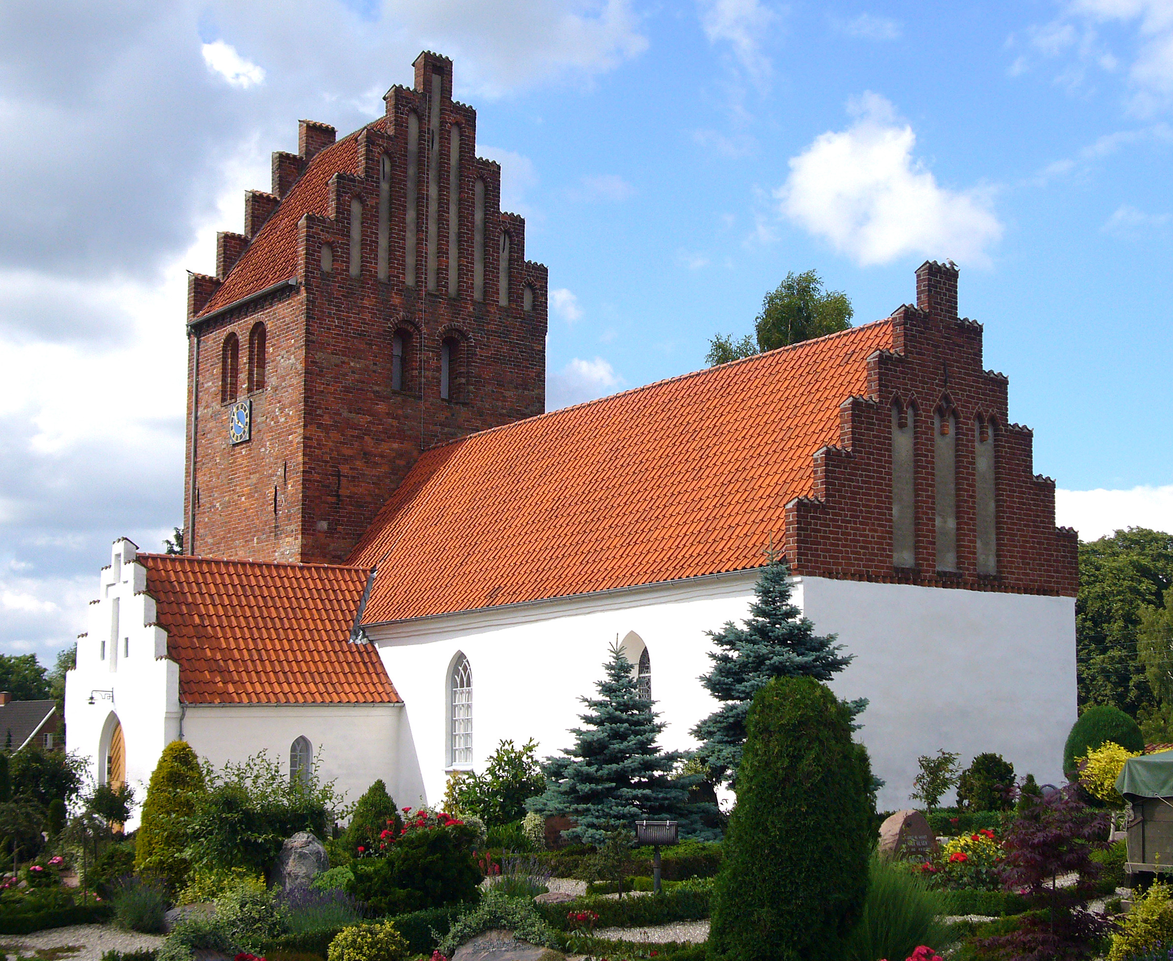 Jersie Kirke, Roskilde County, Denmark.